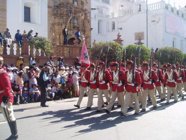 Desfile de Colorados en Sucre